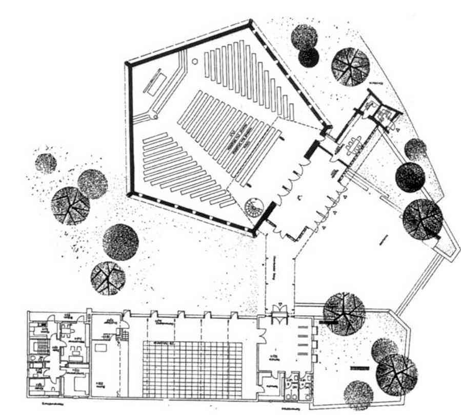 Grundriss der Evangelischen Christuskirche mit Gemeindezentrum, 1959, Sindelfingen, Vordere Halde 23. Architekten: Rall und Röper (Heinz Rall und Hans Röper). Mitarbeit: Erwin Riexinger.